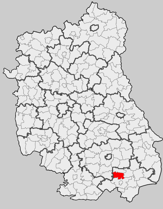 Map of gmina Tarnawatka, Tomaszów Lubelski county, Lublin voivodship Mapa gminy Tarnawatka, powiat tomaszowski, województwo lubelskie